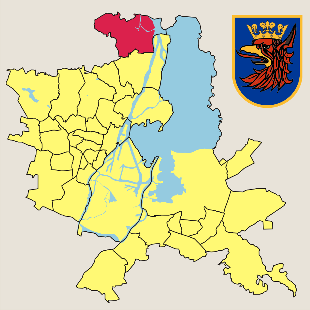 Osiedle "Skolwin" w Szczecinie – jednostka pomocnicza miasta w 2010